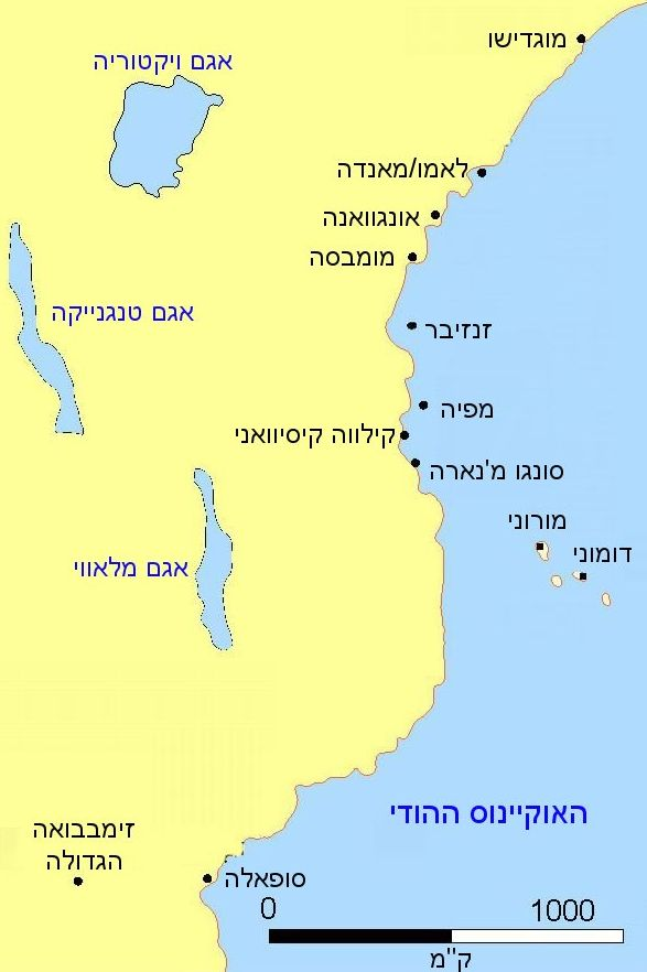 ערי הסחר הסווהילי